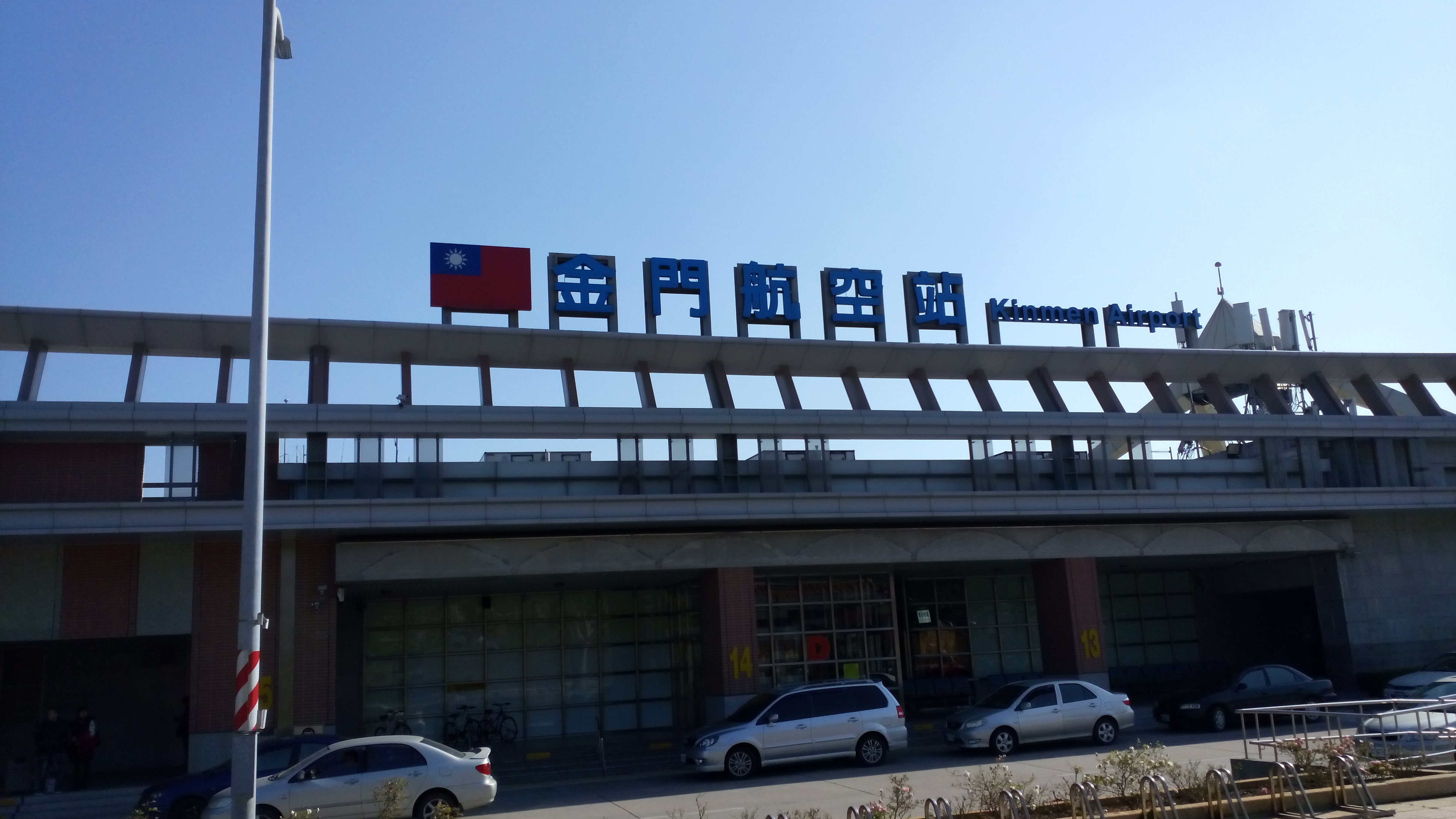 尚義機場 , 金門航空站大門